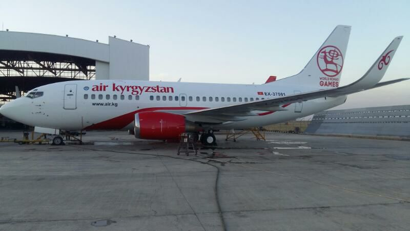 самолет Боинг 737-500 после тех.ремонта и обновленной ливреи